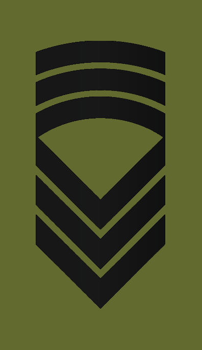 Distinksjon Kommandersersjant